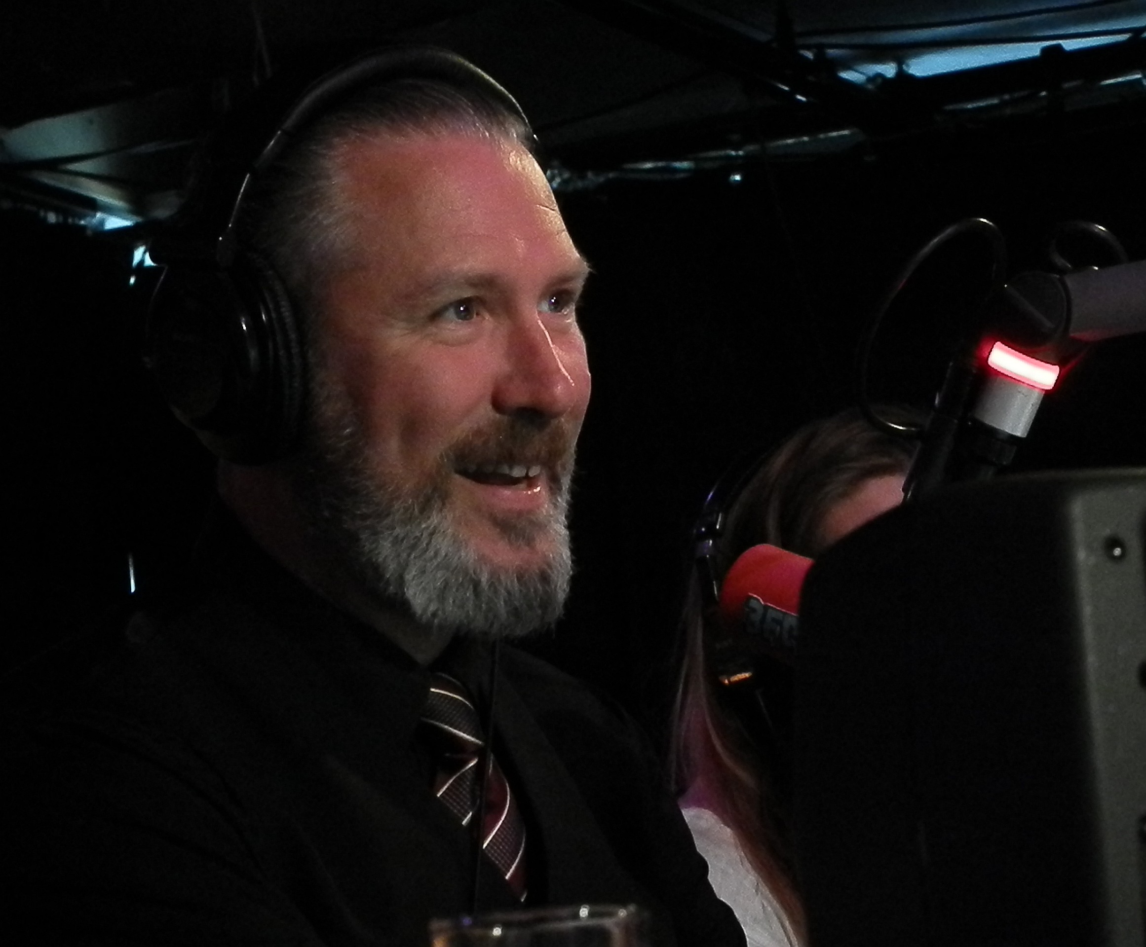 Eric Corton